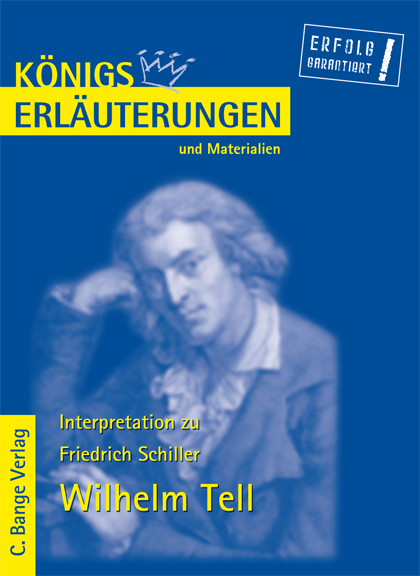 Cover einer Königs Erläuterungen Ausgabe aus dem Jahr 2002. Titel Wilhelm Tell von Schiller.